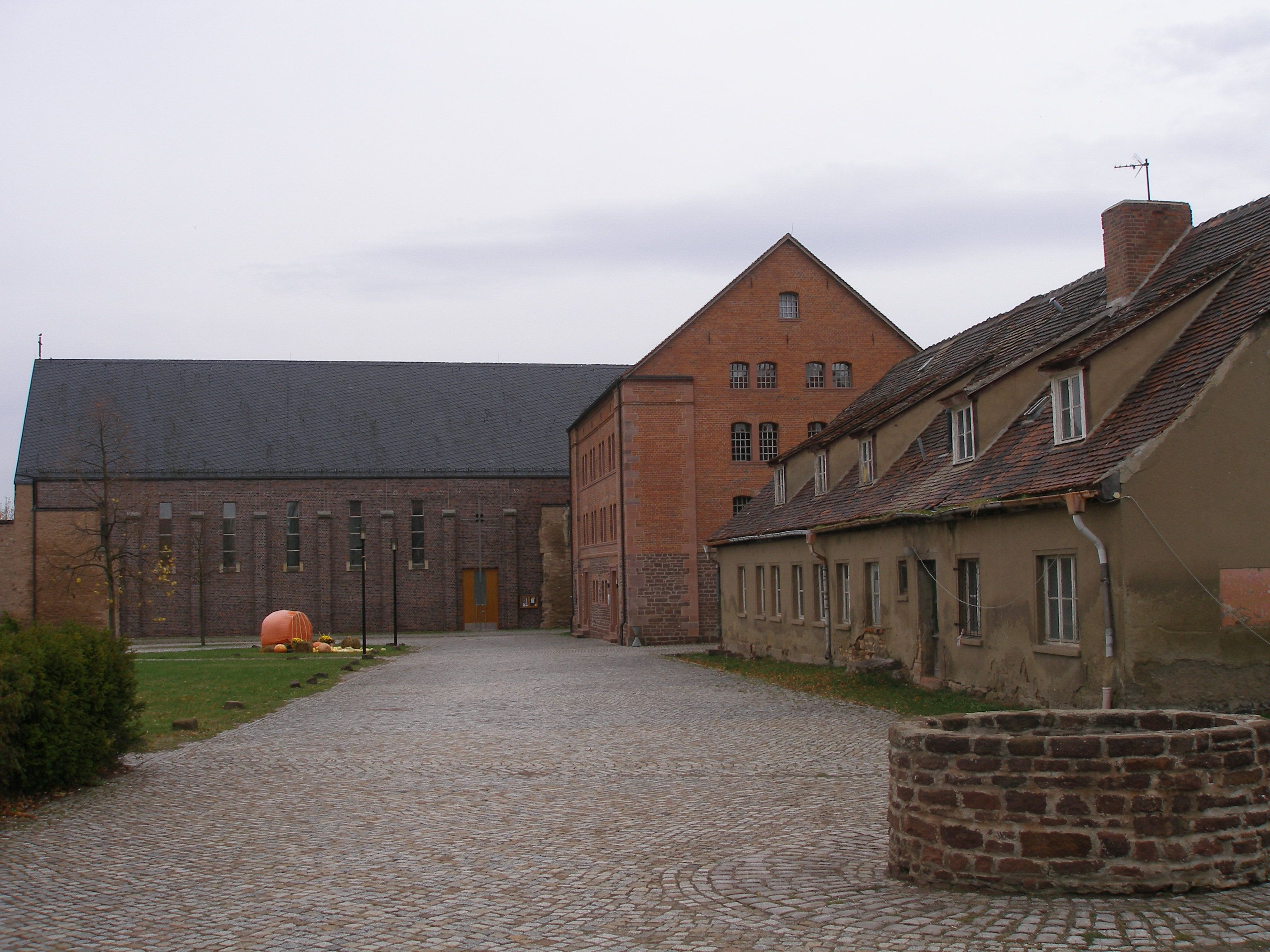 Kloster Helfta